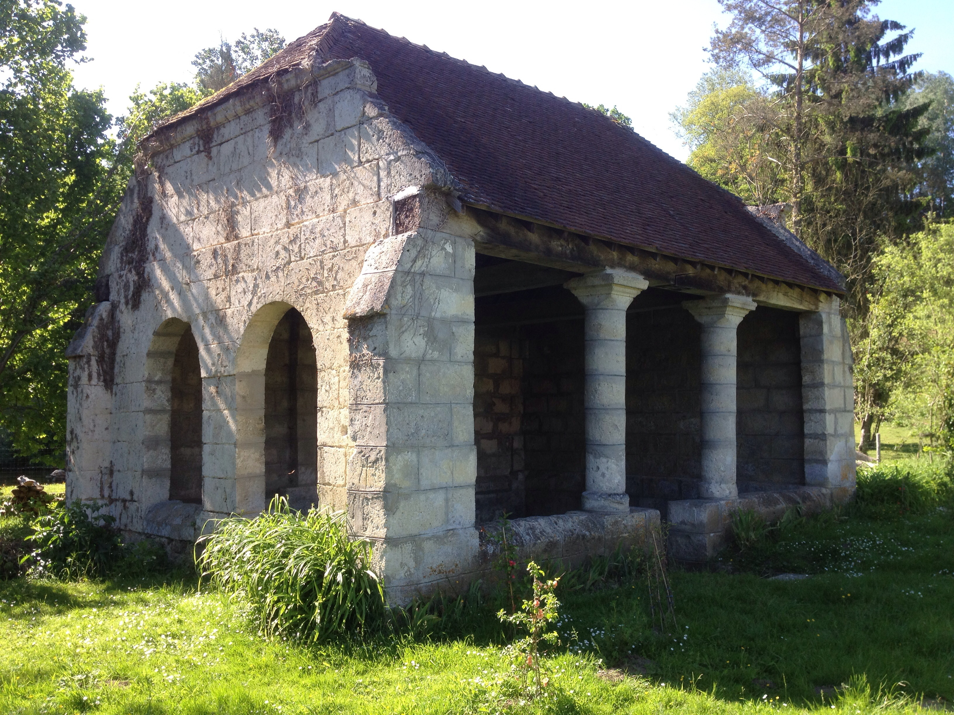 Lavoir du XII e siècle à Septvaux (Aisne, Picardie)